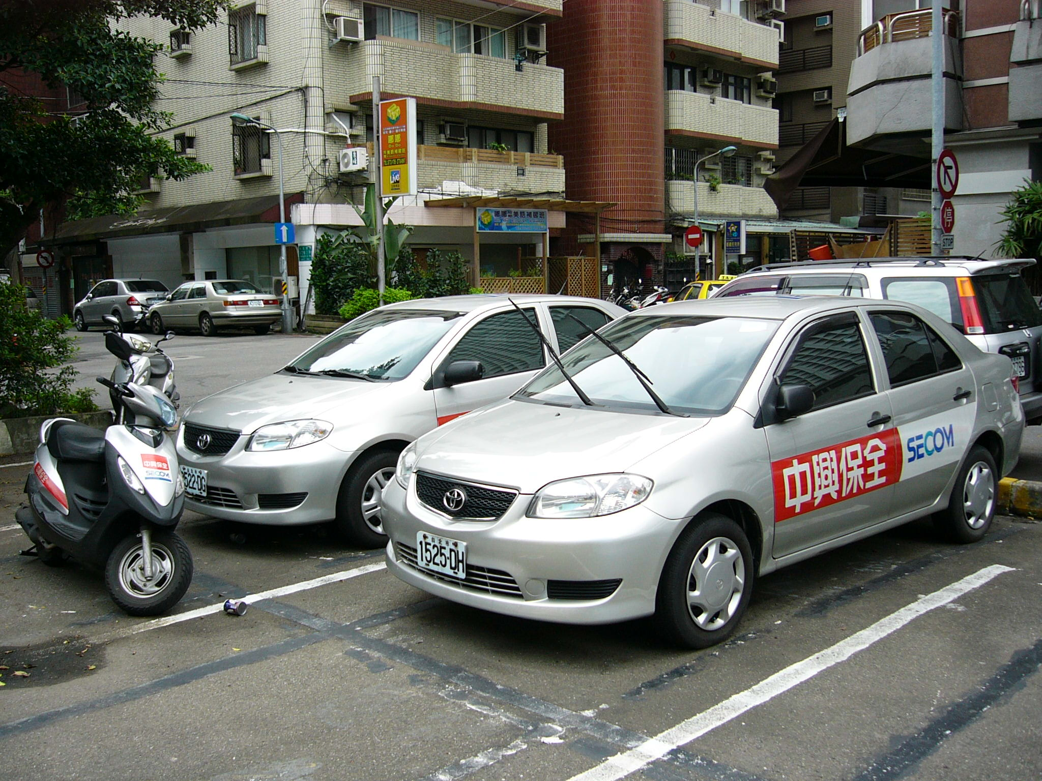 中興保全豐田Vios巡邏車2輛與三陽巡邏機車1輛，停在中華電視公司攝影大樓前停車場。